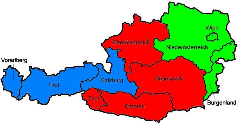 Gliederung der Fußball-Regionalliga in Österreich. Grün = Ost, Rot = Mitte, Blau = West